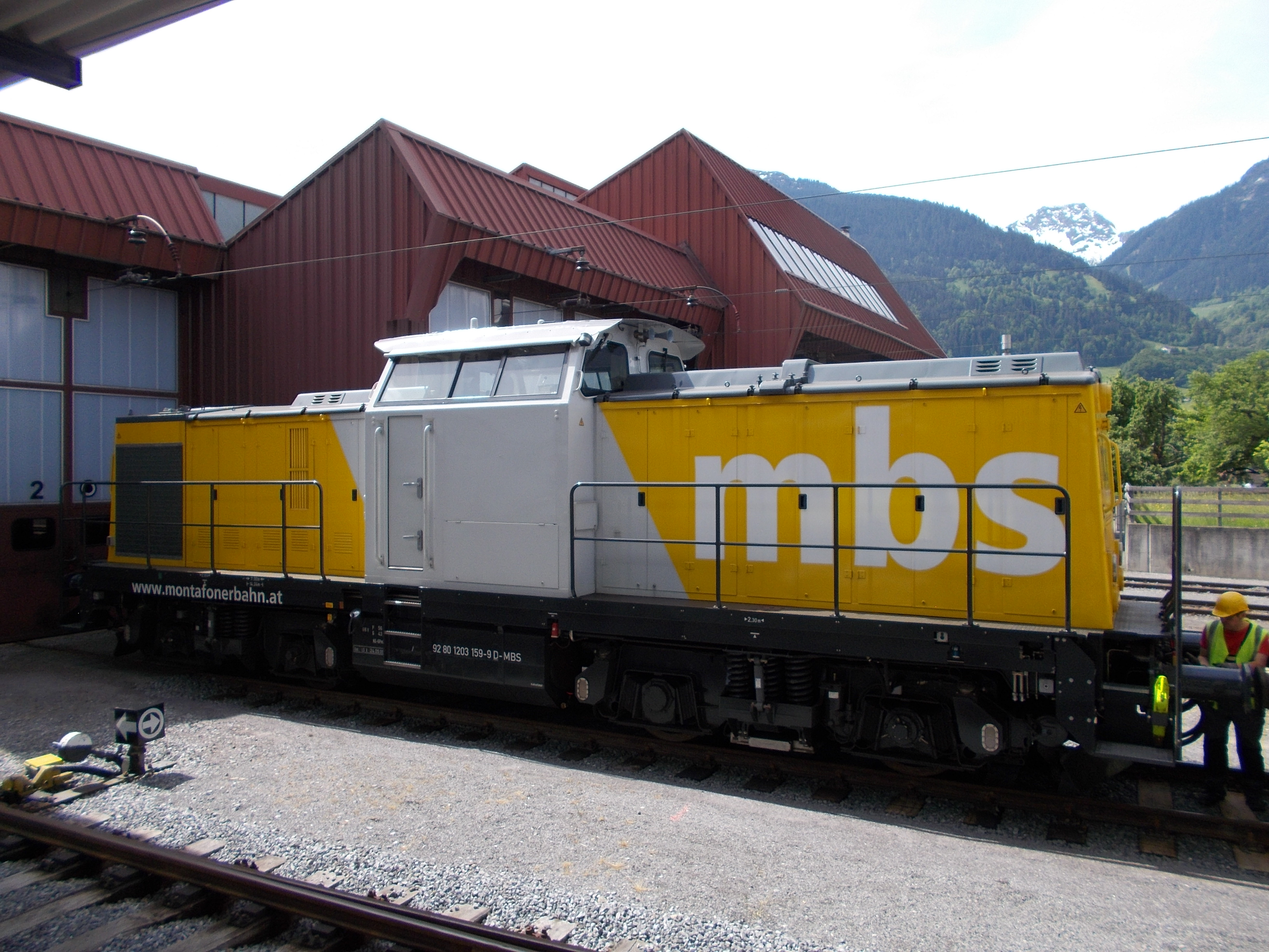 Von Alstom auf der Basis der Reichsbahn-Baureihe 110 für die MBS umgebaute Diesellok vor der Remise in Schruns.